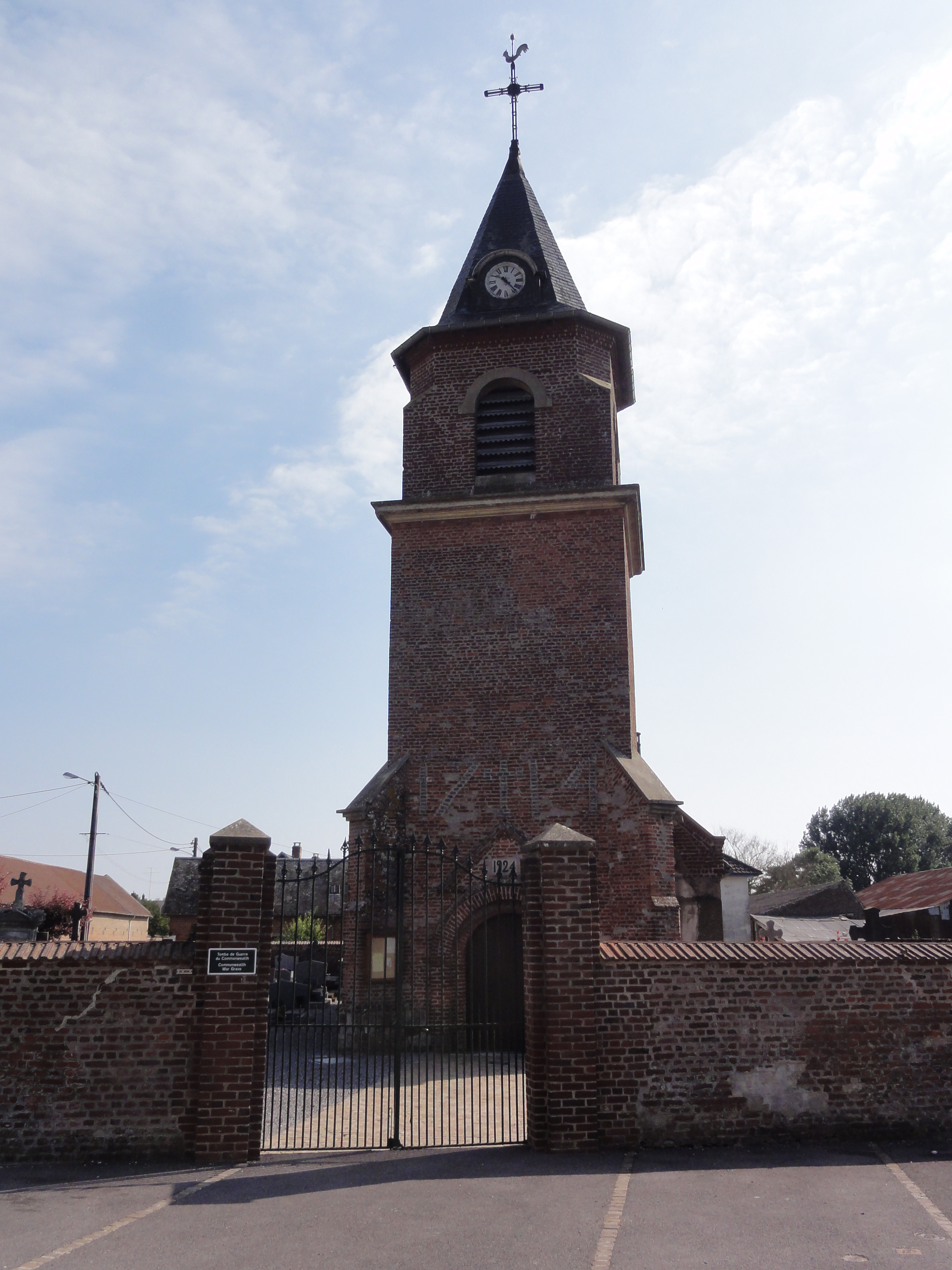 Neuvillette (Aisne) église